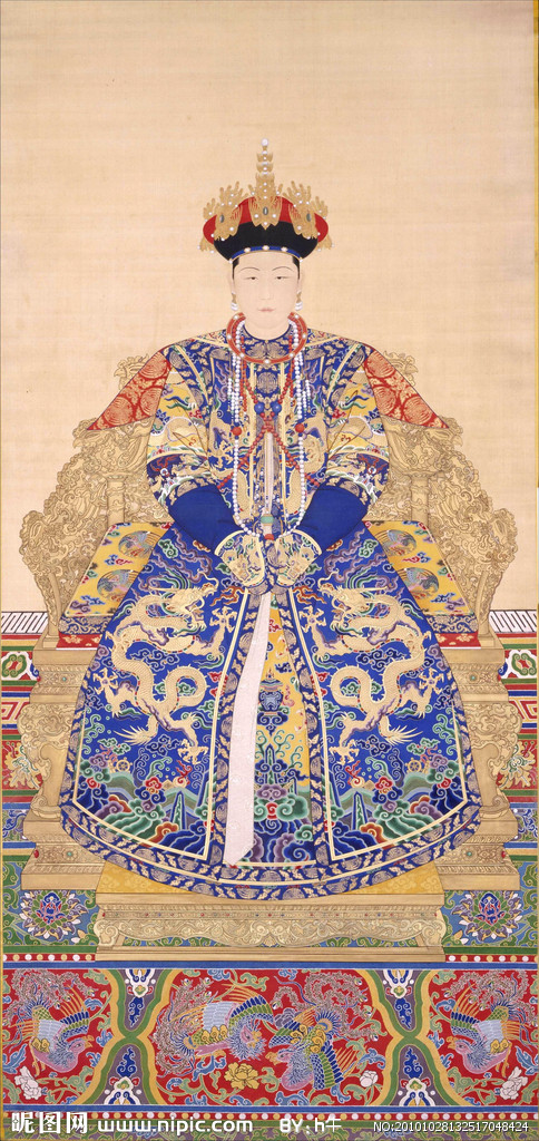 孝诚仁皇后朝服像